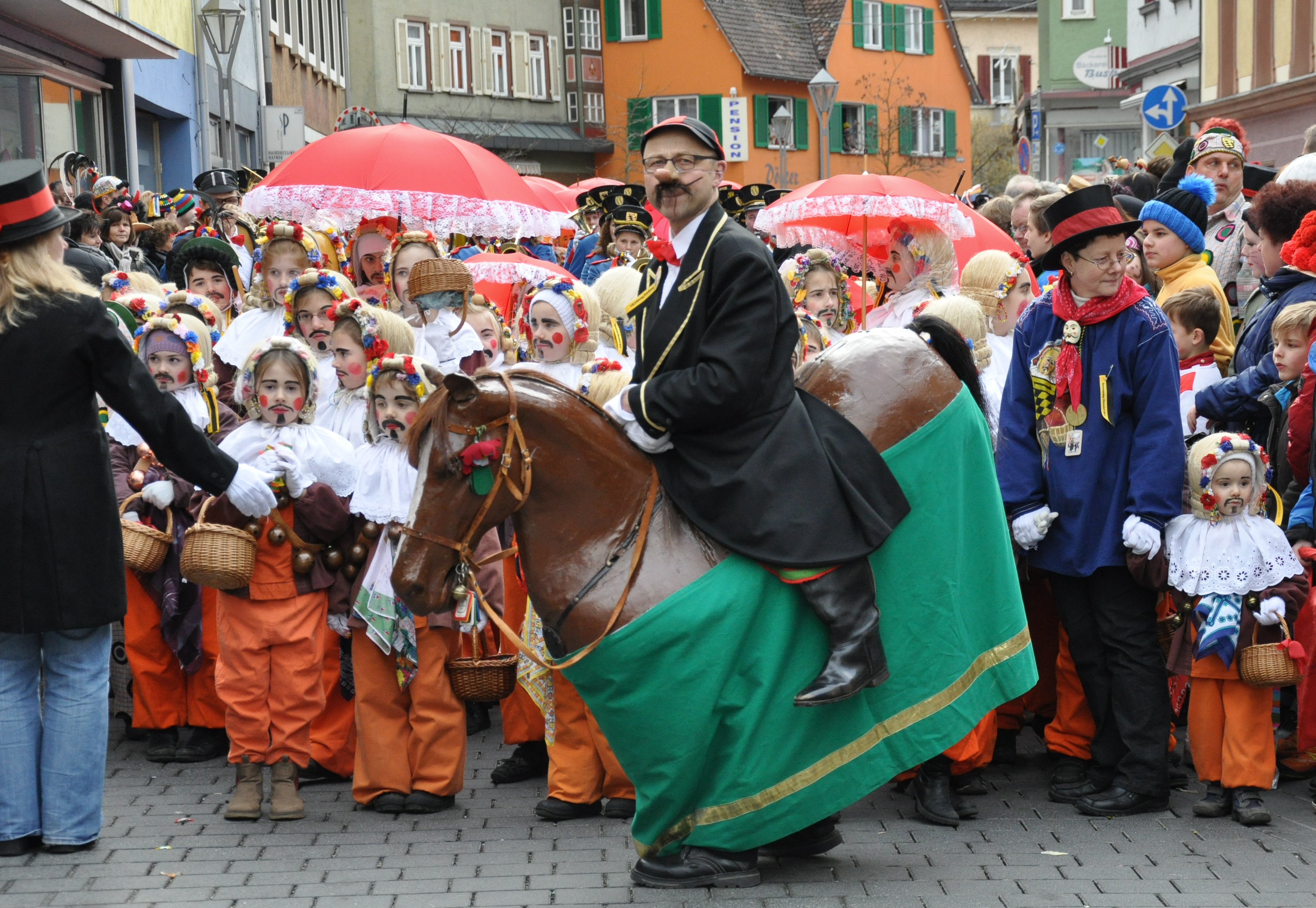 Oberndorf am Neckar, Narrensprung am Fasnetsdienstag nachmittag 2014, Bennerrössle und Hansel (Narrensamen)